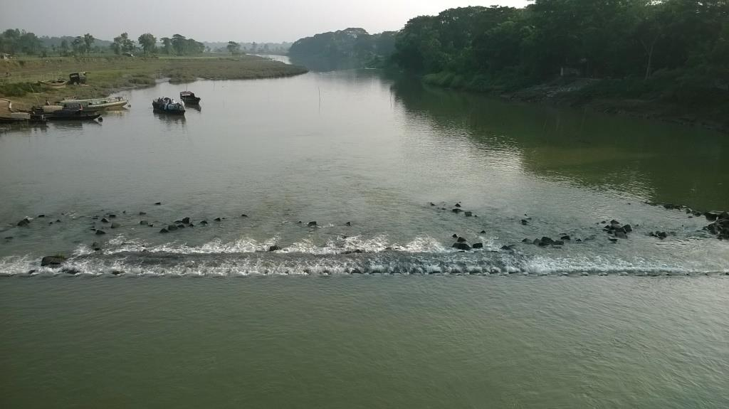 ইছামতি নদীটি রাঙ্গামাটি জেলার কাউখালী উপজেলার ঘাগড়া ইউনিয়নের পাহাড়ি এলাকা হতে উৎপত্তি লাভ করেছে।নদীটির দৈর্ঘ্য ৩৭ কিলোমিটার এই নদীর জলধারা চট্টগ্রাম জেলার রাঙ্গুনিয়া উপজেলার মরিয়মনগর ইউনিয়ন পর্যন্ত প্রবাহিত হয়ে কর্ণফুলী নদীতে নিপতিত হয়েছে। রাজানগর, পারুয়া, হোসনাবাদ, রাঙ্গুনিয়া ইউনিয়ন দিয়ে প্রবাহকালে বেশ কয়েকটি ছোট খাল ও ছড়া এই নদীর সঙ্গে মিলিত হয়েছে। মৌসুমি প্রকৃতির এই নদীতে সারাবছর পানিপ্রবাহ থাকে না। তবে বর্ষাকালে নদীটিতে স্বাভাবিকের চেয়ে পানির প্রবাহ বৃদ্ধি পায়।